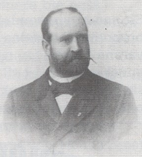 Gerhard Schønning. Bildet er fra sent på 1800-tallet, og bildeopphasrett løper ut etter 70 år.